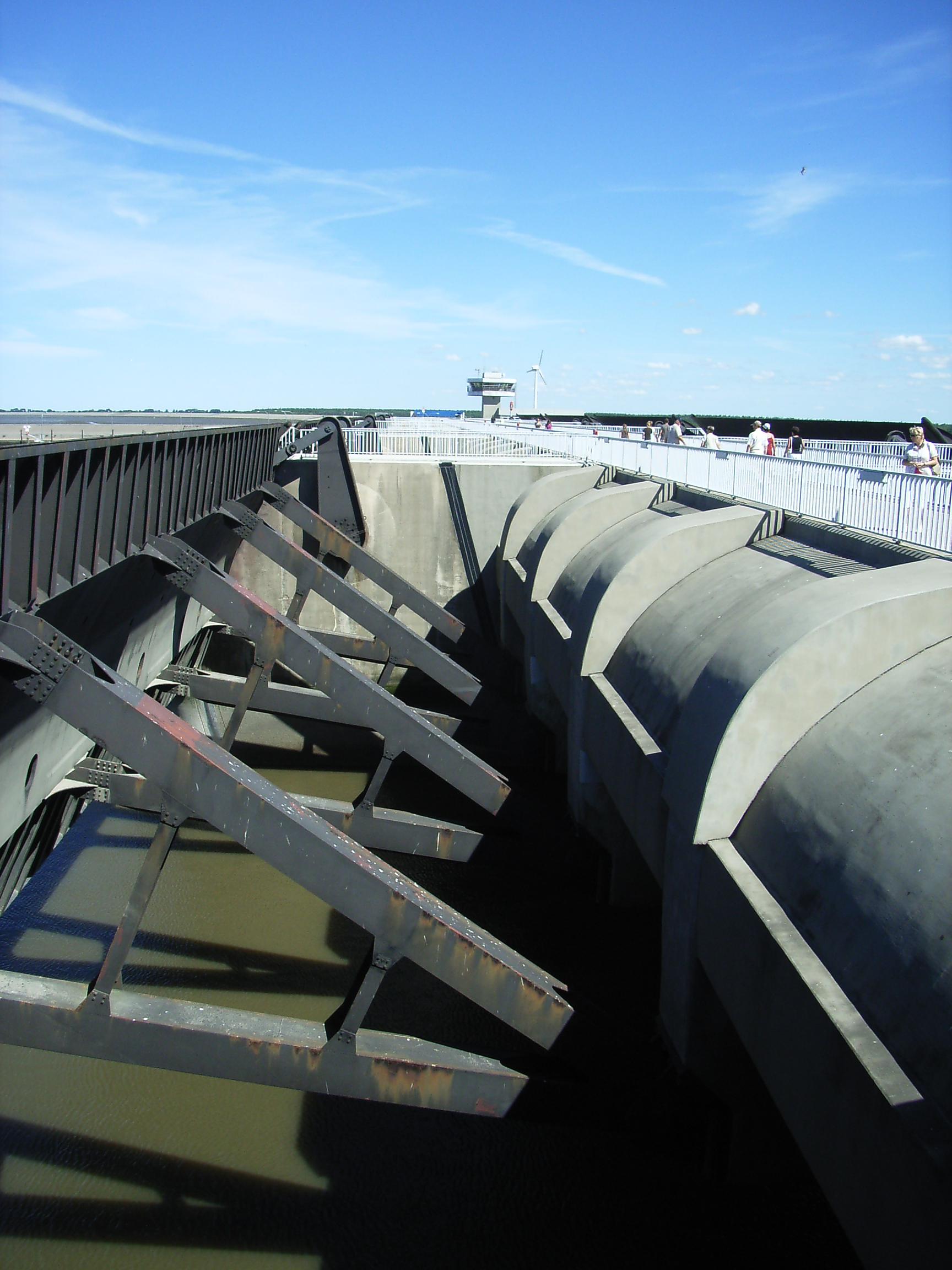 Eidersperrwerk